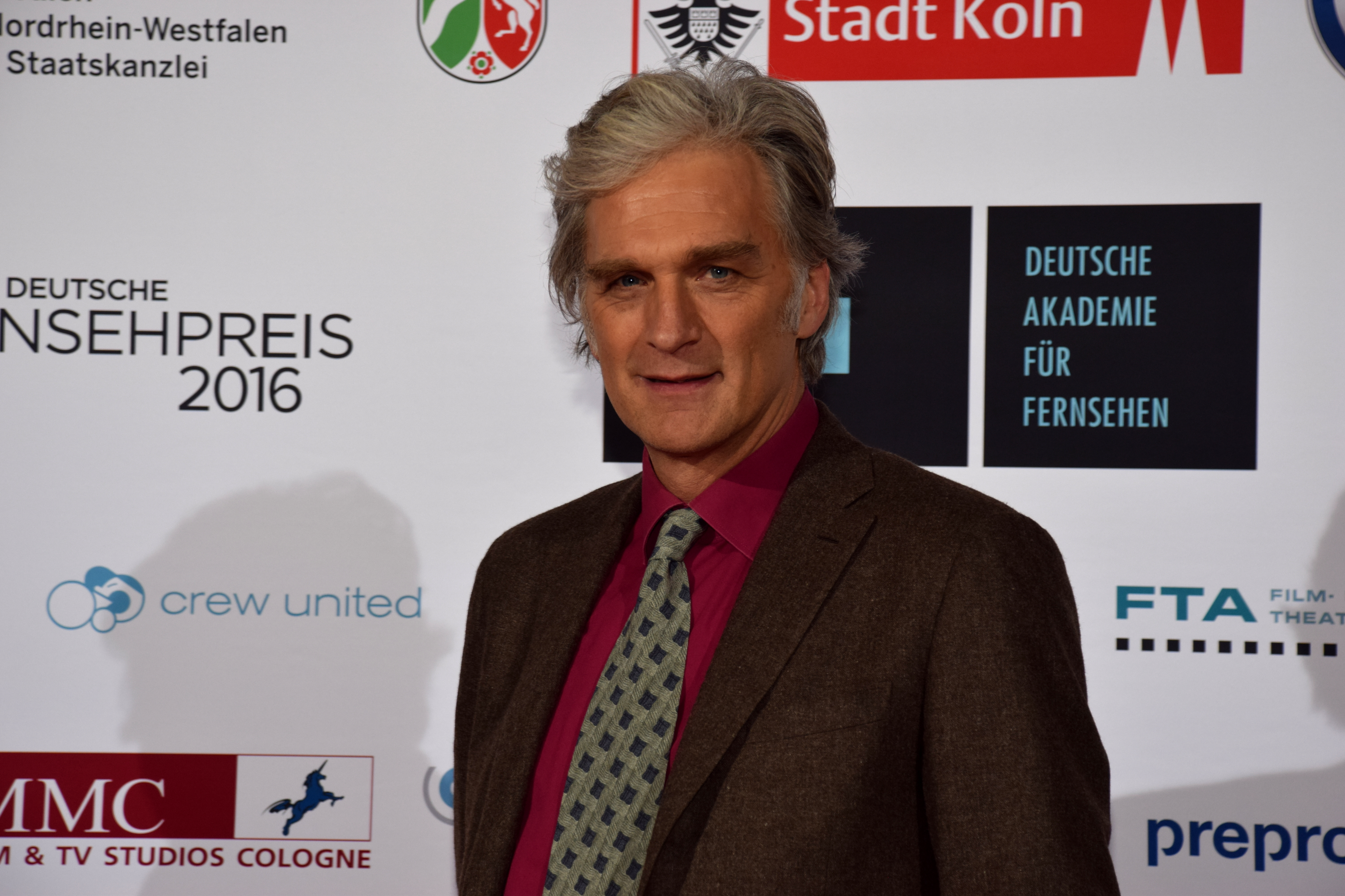 Walter Sittler Deutsche Akademie für Fernsehen - Symposium und Preisverleihung 2015 in Köln